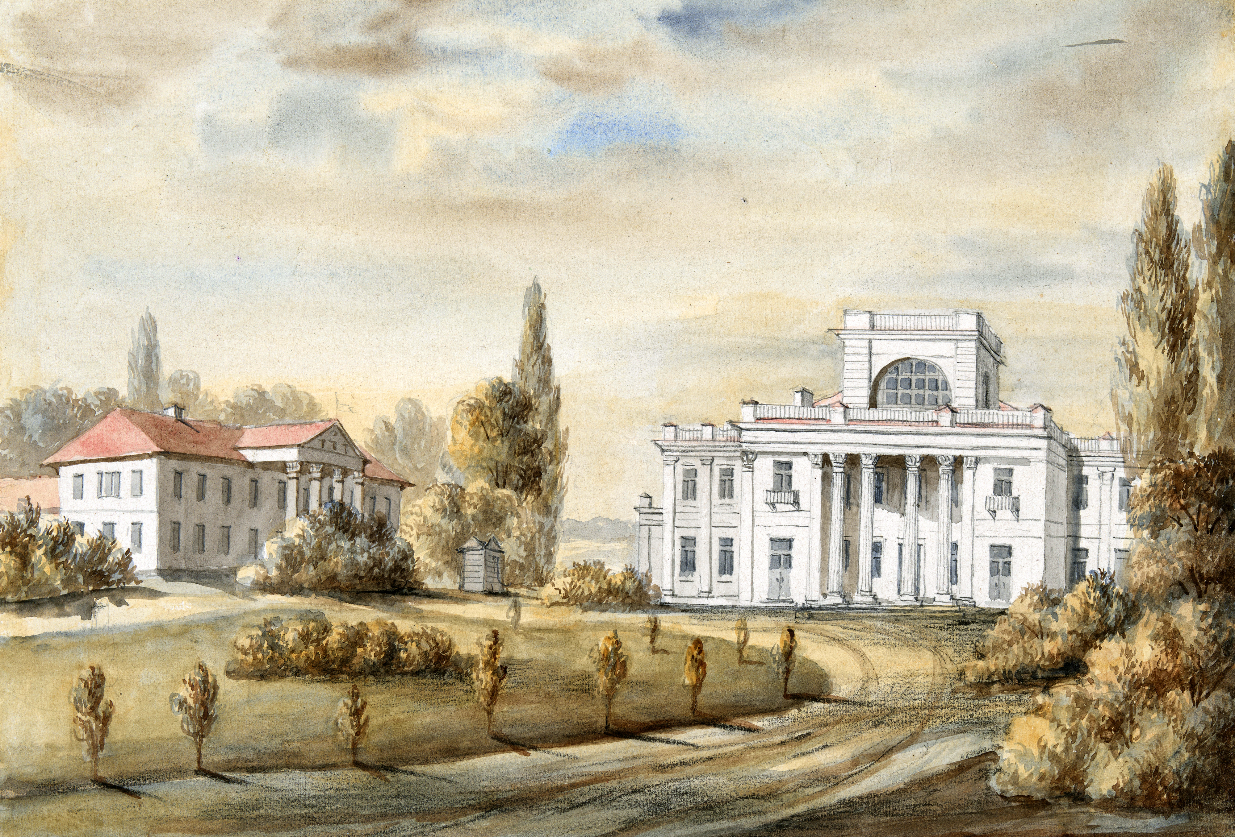 Беларуская (тарашкевіца): Жэмласлаў (Žemłasłaŭ), сядзіба Ўмястоўскіх (Umiastoŭski)